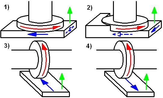 Movimientos básicos de fresado. 1.- Fresado frontal (planeado) 2.- Fresado en escuadra 3.- Fresado tangencial en oposición o fresado normal. 4.- Fresado tangencial en concordancia o fresado en equicorriente. Movimiento de corte. Movimiento de avance. Movimiento de profundización. You can contribute by translating this description into more languages.